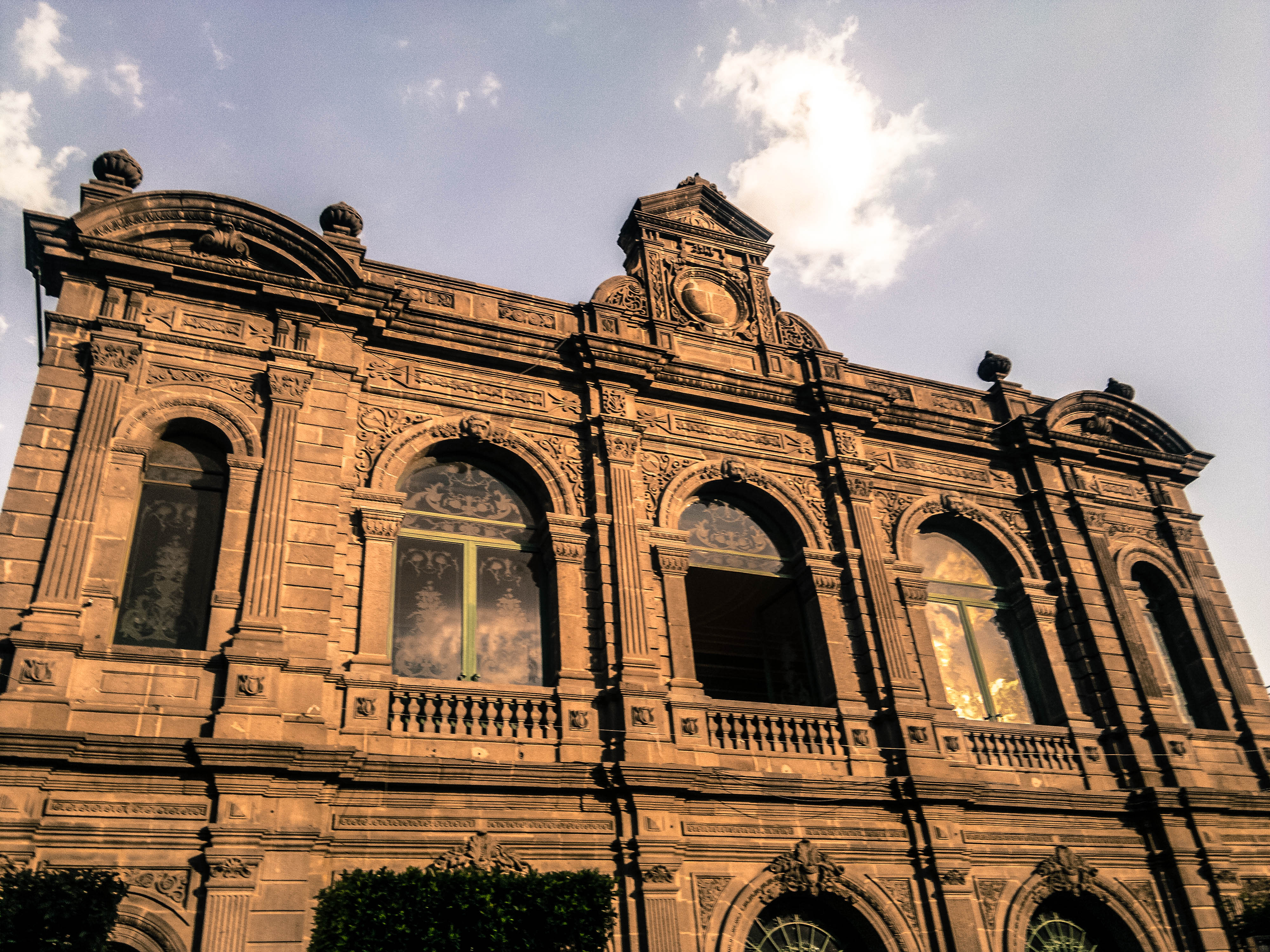 Centro, Tlaxcala de Xicohténcatl, Tlax., Mexico